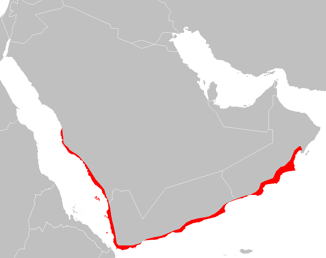 Arabian Peninsula coastal fog desert ecoregion map